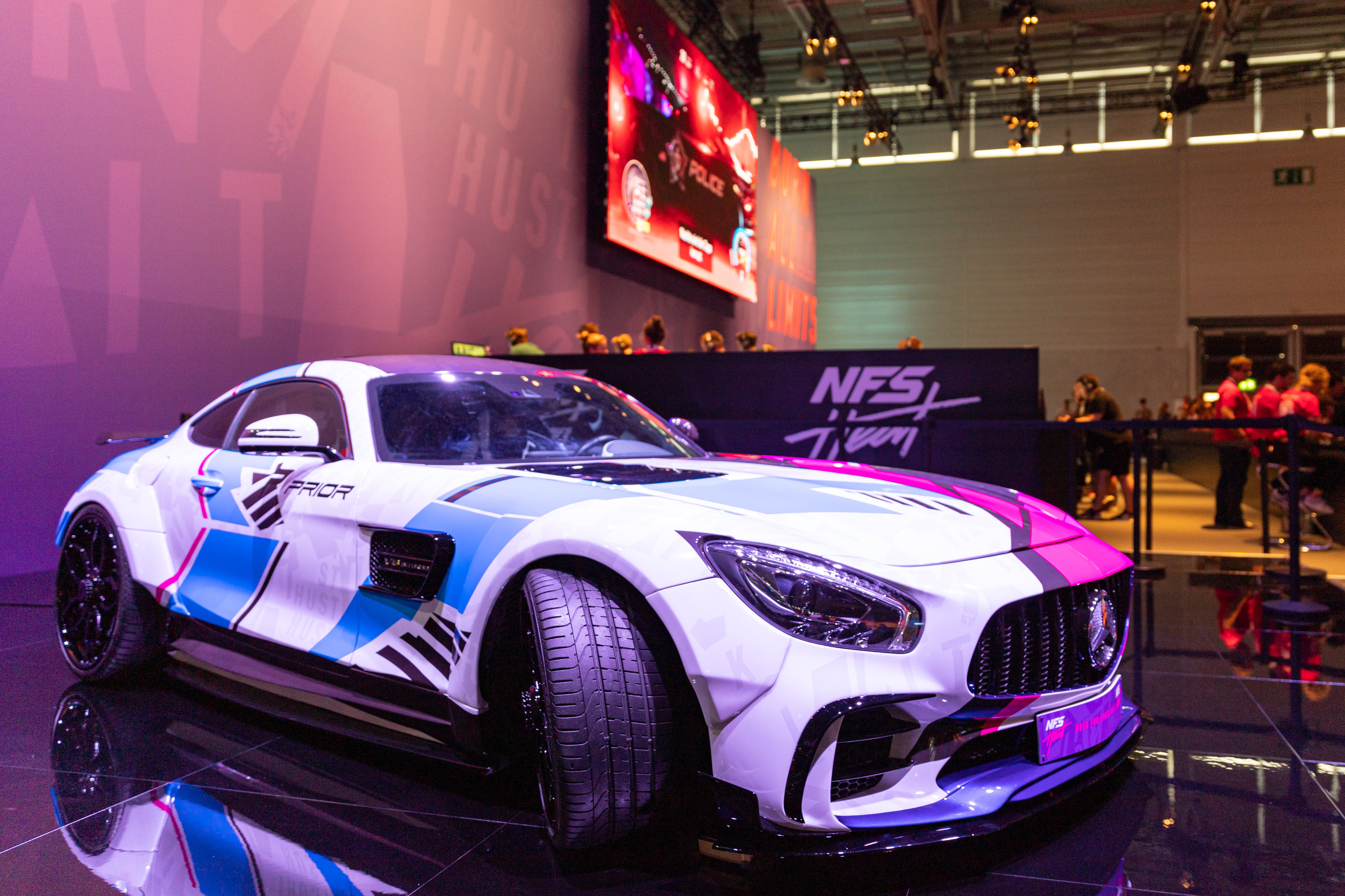 NFS car Gamescom 2019